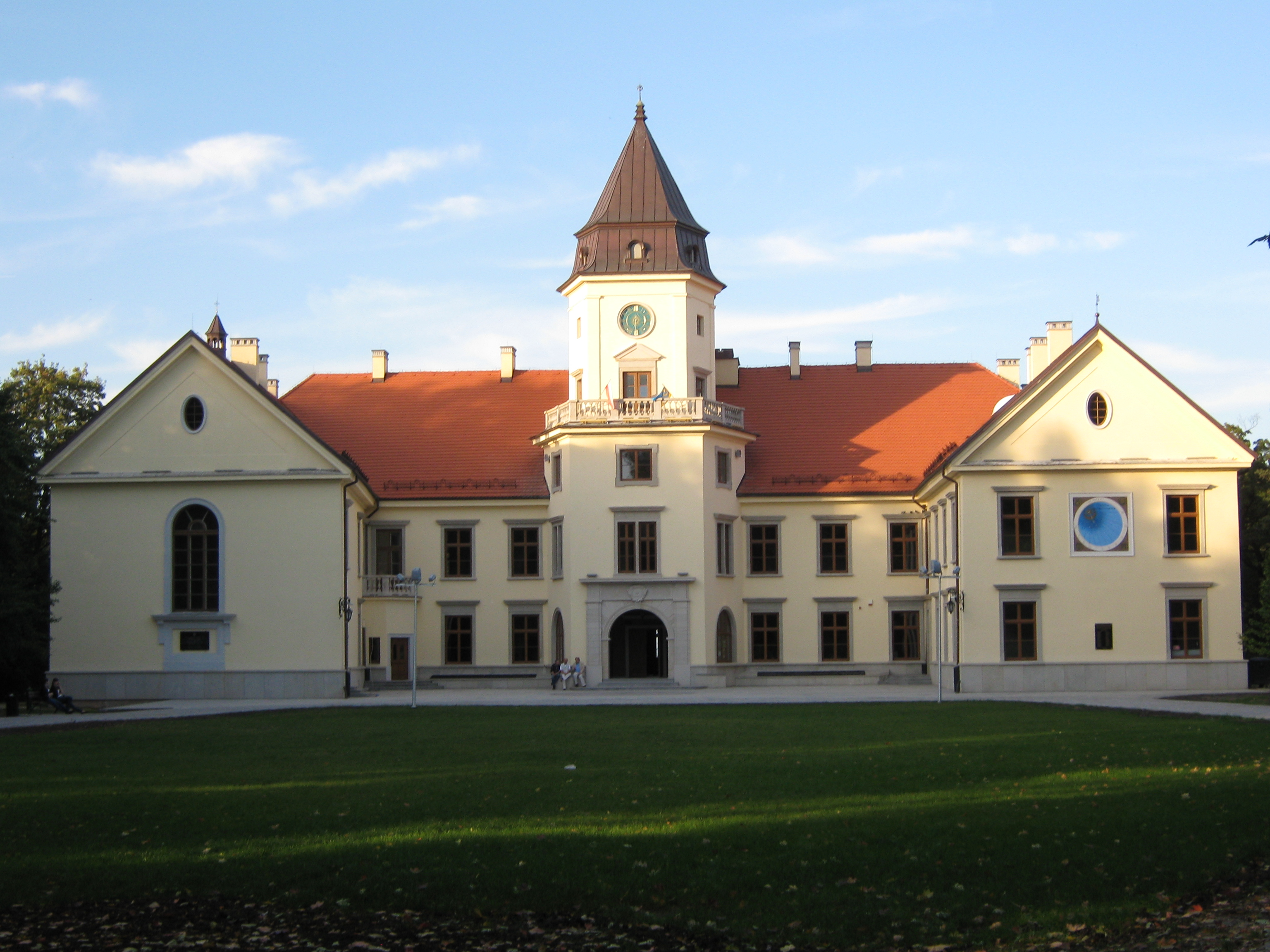 Pałac Tarnowskich w Tarnobrzegu (zabytek nr A-908 z 29.04.1975, 209/A z 4.06.1984)